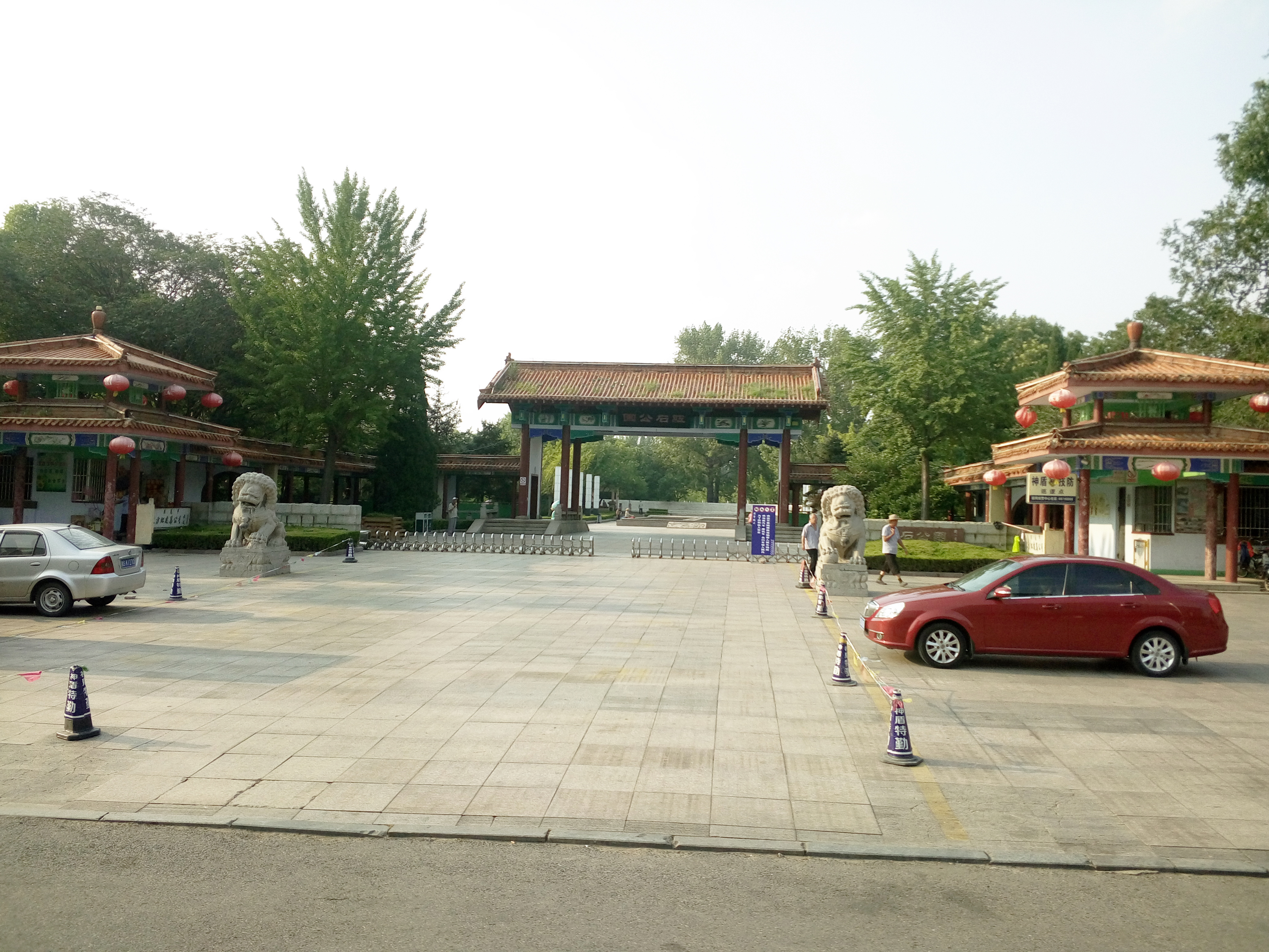 山东省莱芜市莱城区红石公园大门